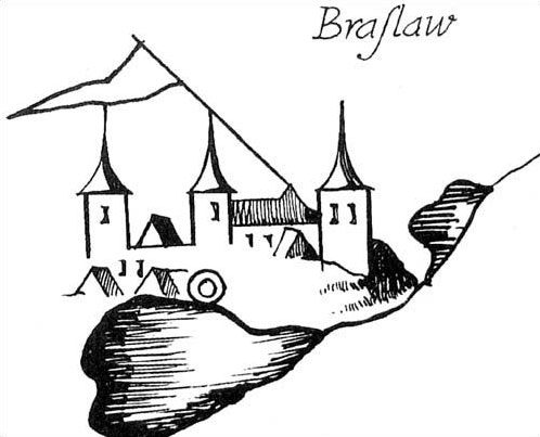 Беларуская (тарашкевіца): Браслаў (Brasłaŭ). Замак